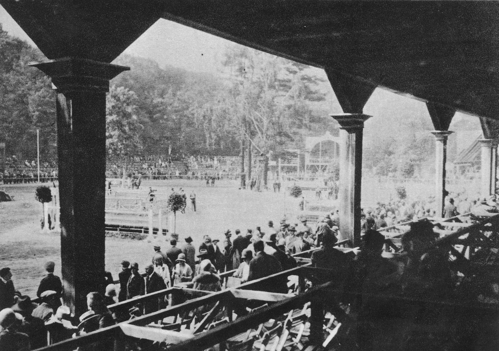 Hipodrom w Łazienkach Królewskich w Warszawie